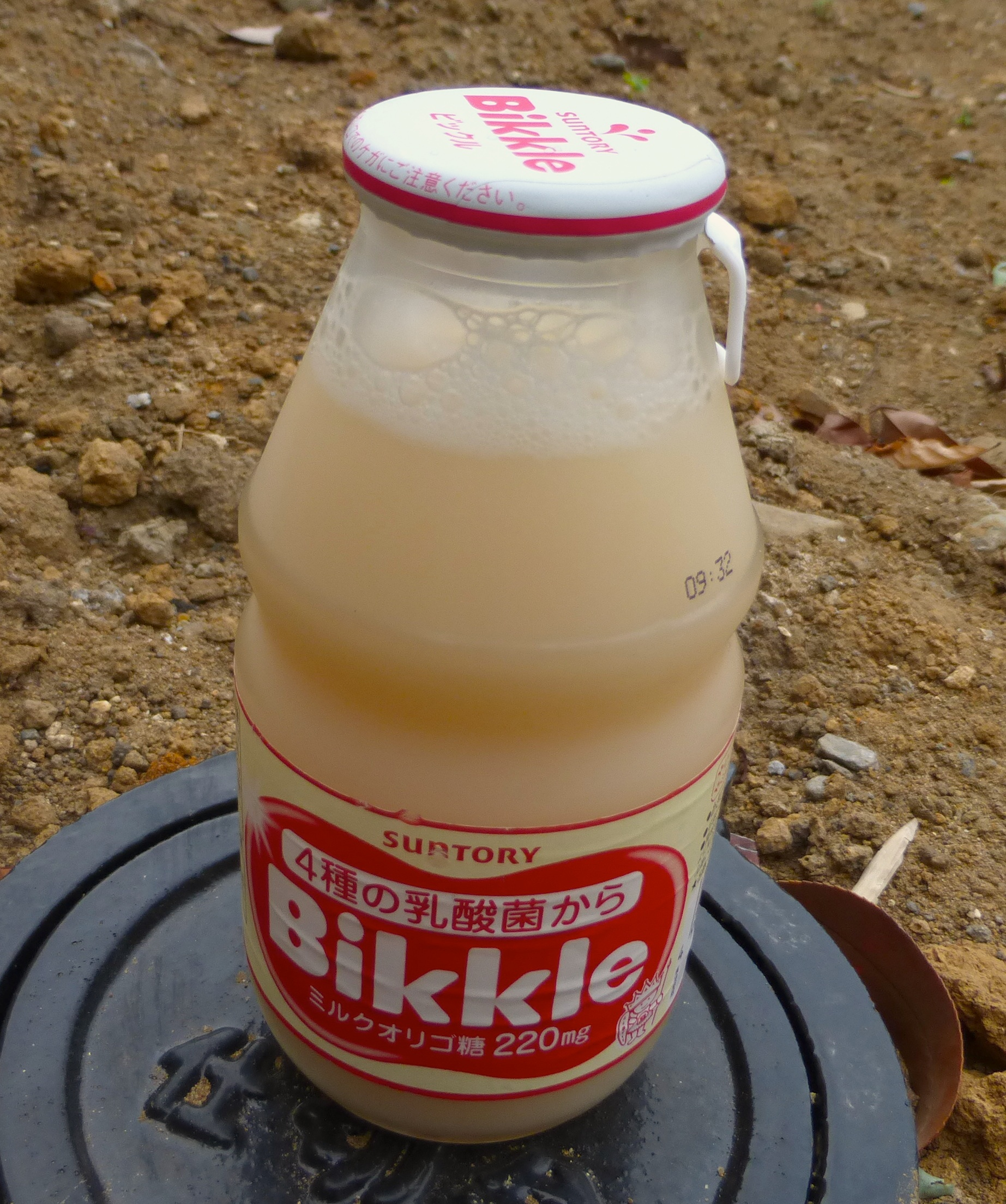 Bikkle is a Japanese yogurt-based drink.